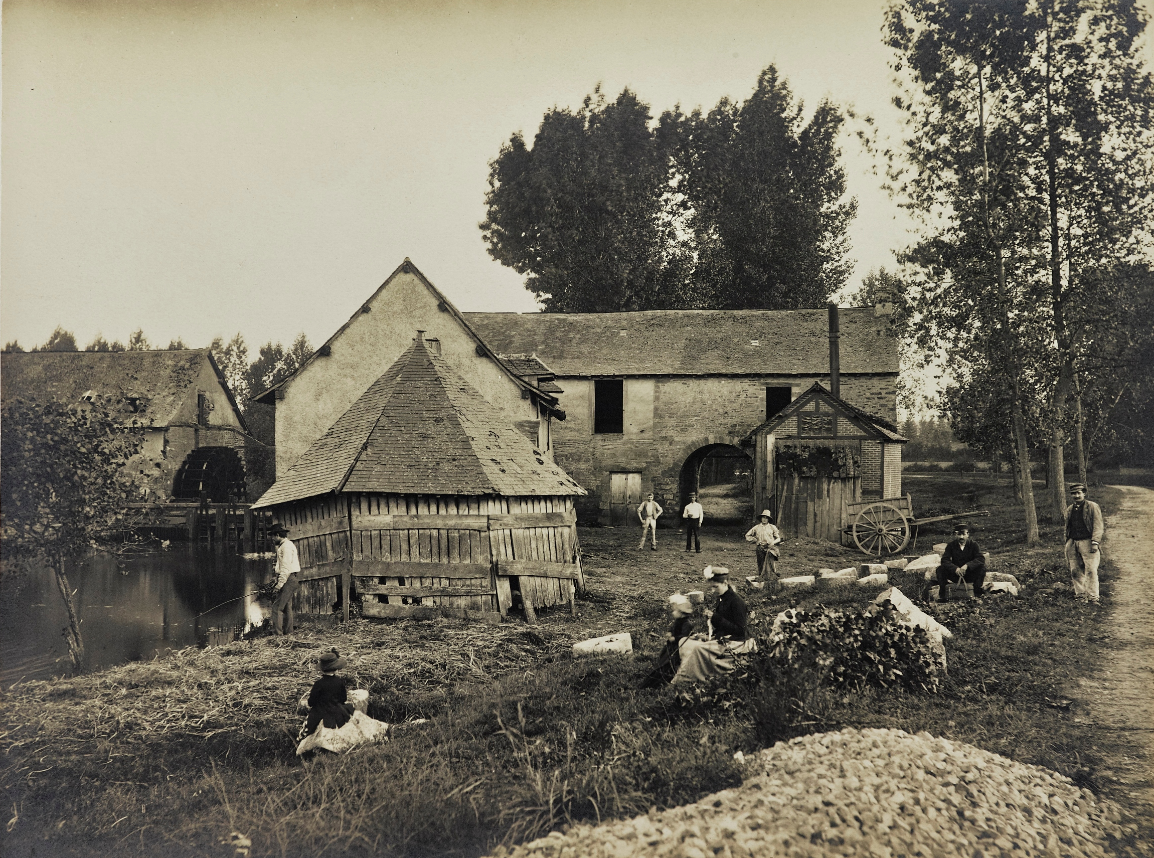 Le moulin de Trublé en 1890 avant sa transformation en tannerie.